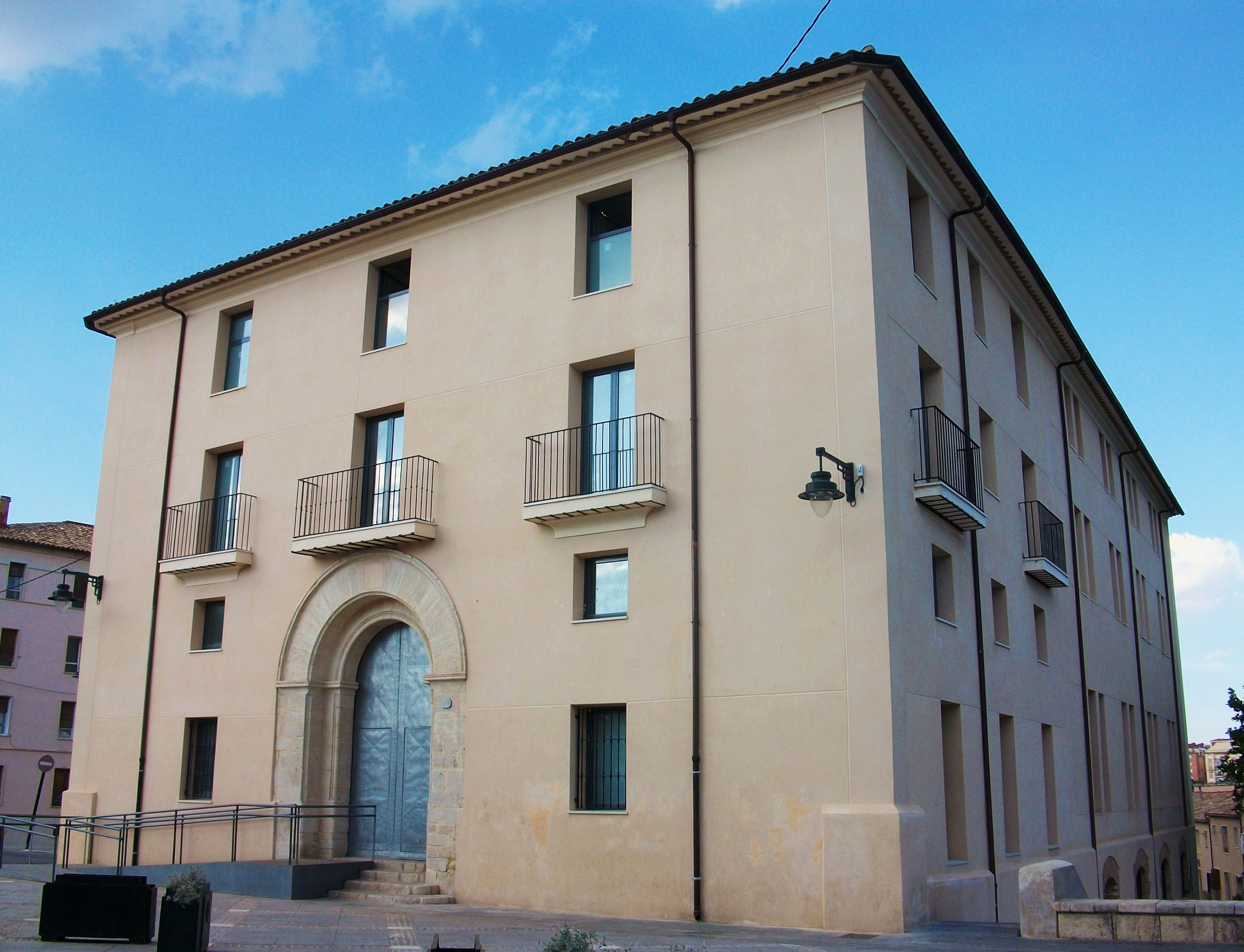 Antic edifici de l'hospital d'Alcoi, abans església i actualment jutjats.